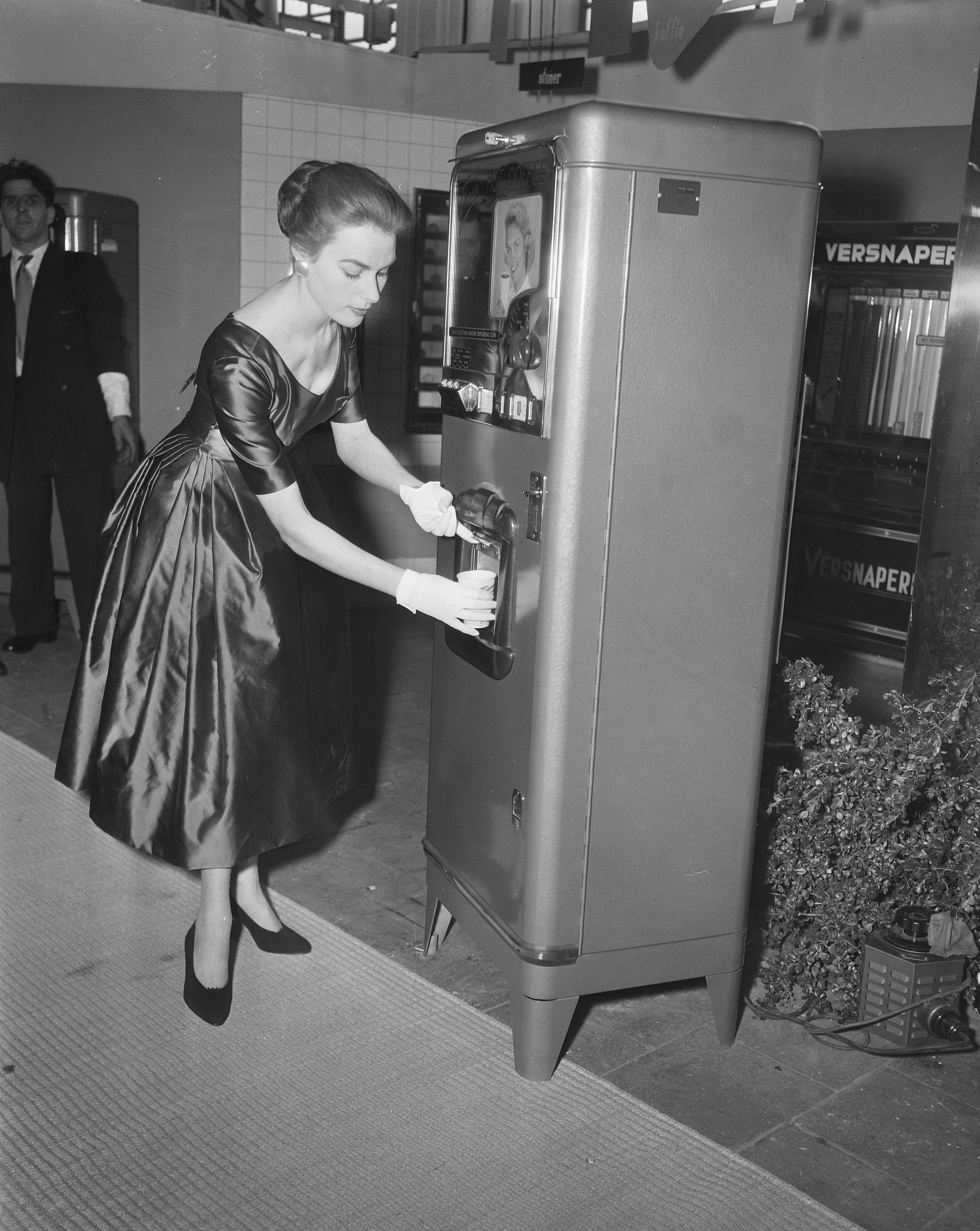 Collectie / Archief : Fotocollectie Anefo Reportage / Serie : [ onbekend ] Beschrijving : Najaarsbeurs Utrecht. Koffieautomaat Datum : 11 september 1956 Locatie : Utrecht Fotograaf : Pot, Harry / Anefo Auteursrechthebbende : Nationaal Archief Materiaalsoort : Negatief (zwart/wit) Nummer archiefinventaris : bekijk toegang 2.24.01.04 Bestanddeelnummer : 907-9938